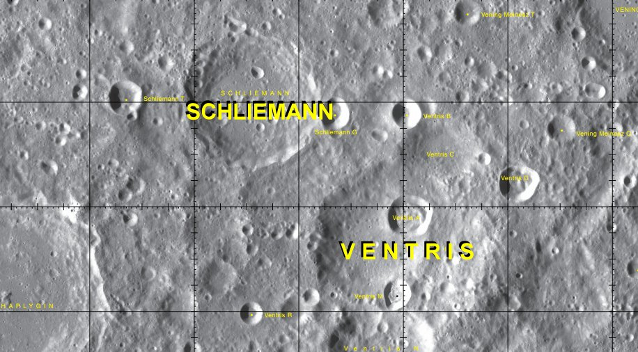 Cráter lunar Schliemann. Localización. (Imagen LRO)